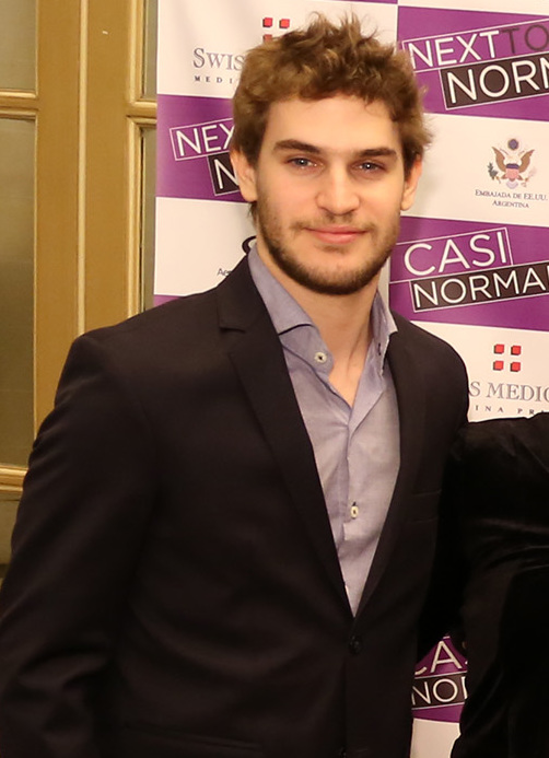 Matías Mayer, Manuela del Campo, Mariano Chiesa, Fernando Dente, entre otros en un evento en el Palacio Bosch